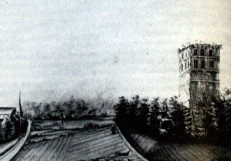 Kloster Östringsfelde 1789. Zeitgenössisches Gemälde von Dunker